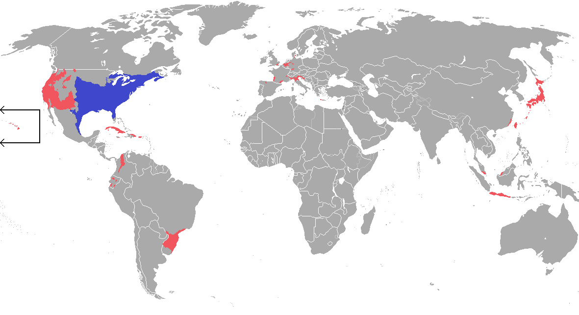 Cutted out of image File:Lithobates catesbeianus distribution.png, replaced French Polynesia